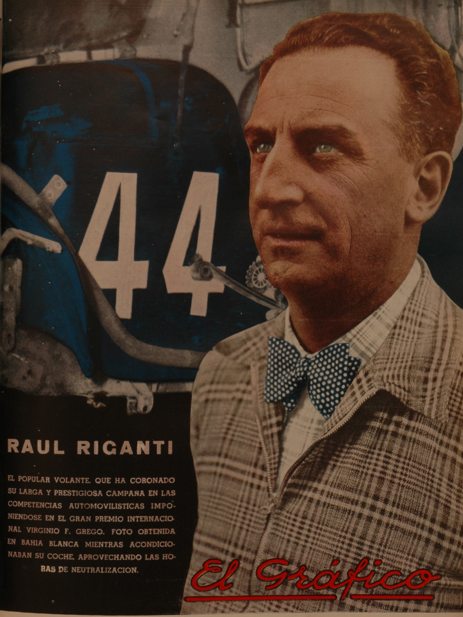 El Grafico del 07 de Marzo de 1936. Edicion 869